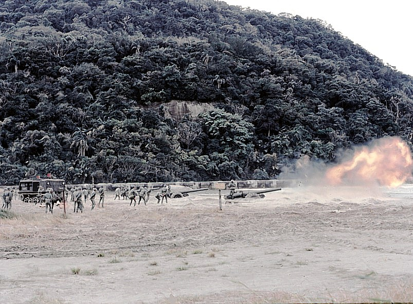 Exército Brasileiro em exercício de tiro, Praia Grande, Estado de São Paulo, Brasil, Ano 1975.